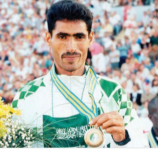 صورة مدالية ذهبية للاعب العداء الكابتن / سعد شداد الأسمري